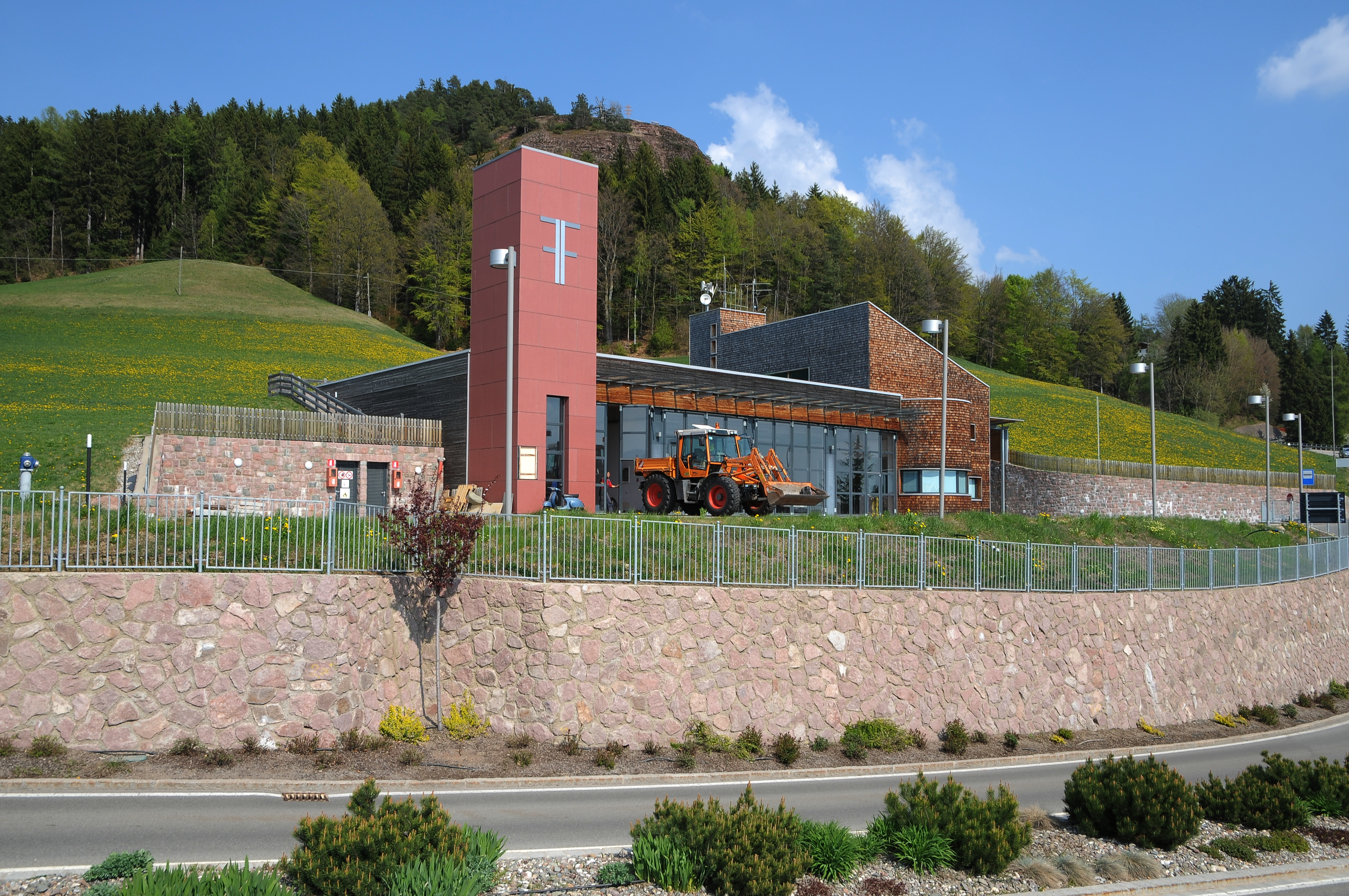 Feuerwehrhaus in Vöran.